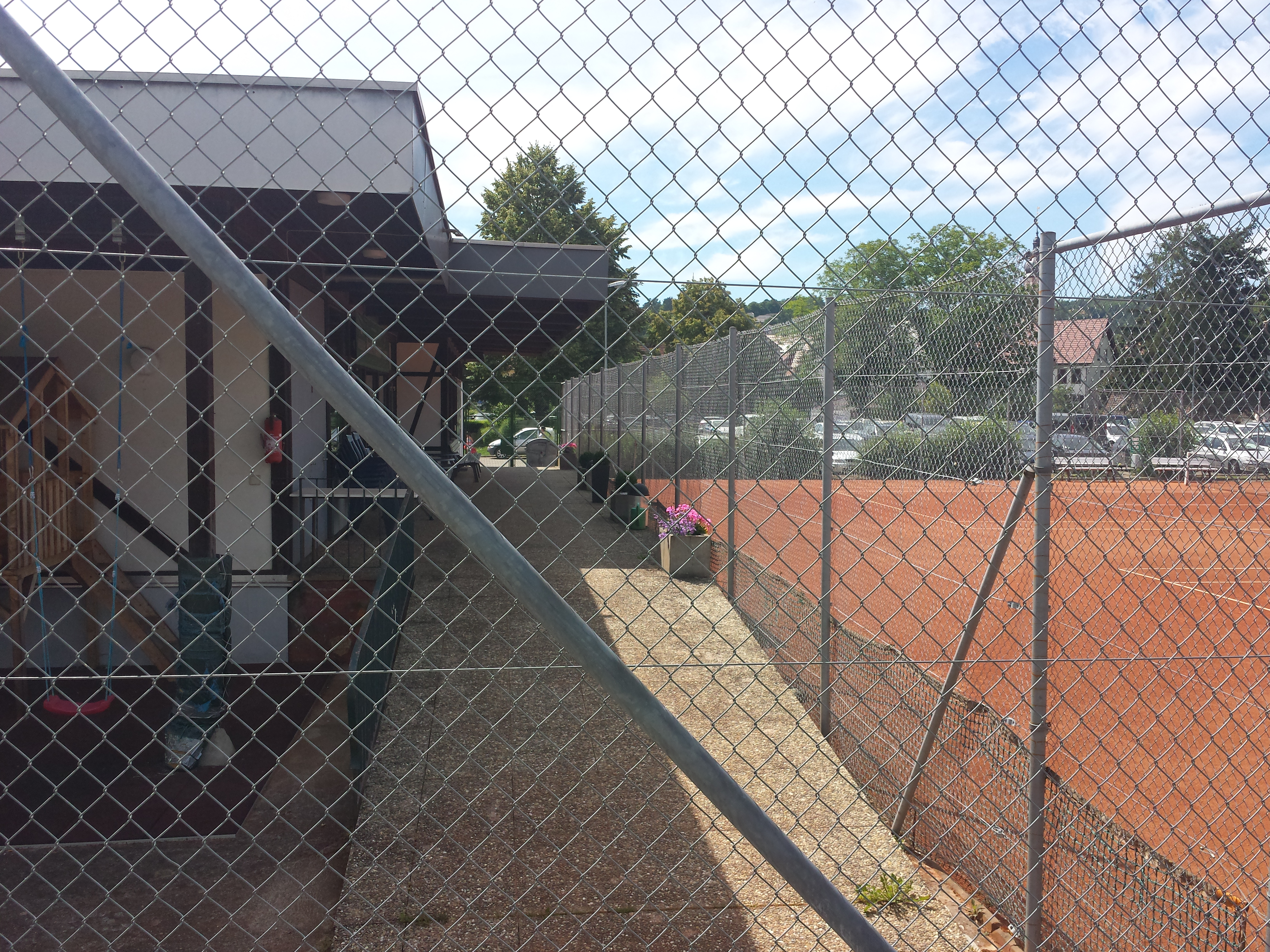 Tennisplätze und Clubhaus der Tennisabteilung des TSV Tauberbischofsheim.